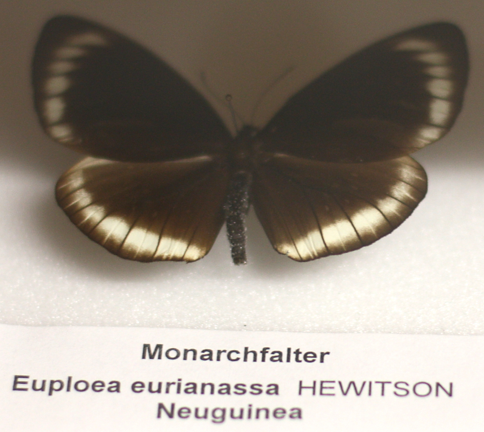 Naturkundliche Sammlung Übermaxx Überseenuseum Bremen; Schmetterlinge und andere Euploea eurianassa Hewitson, [1858]